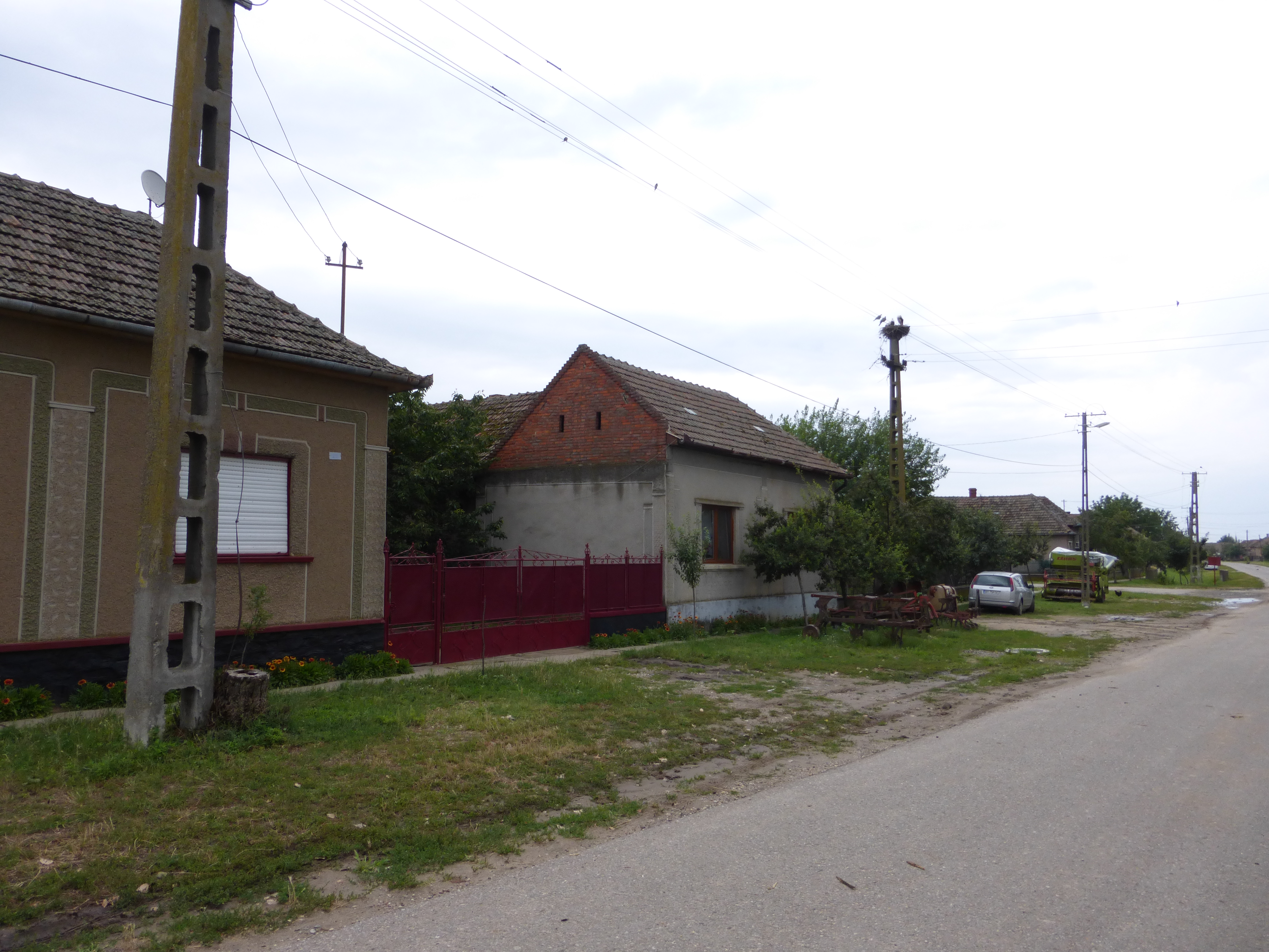 Fundort des Helmes von Ciumesti